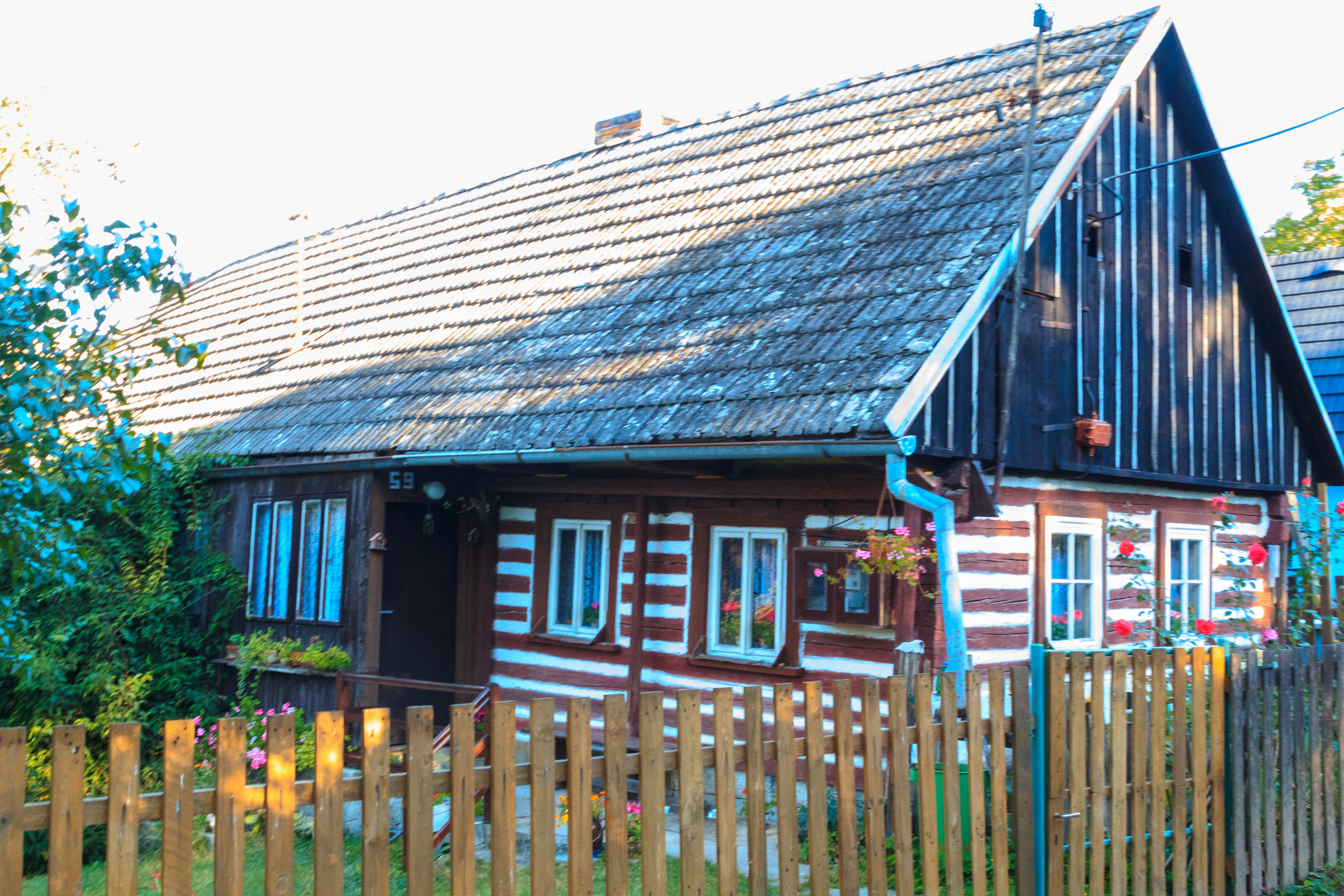 Šidloby - čp. 59